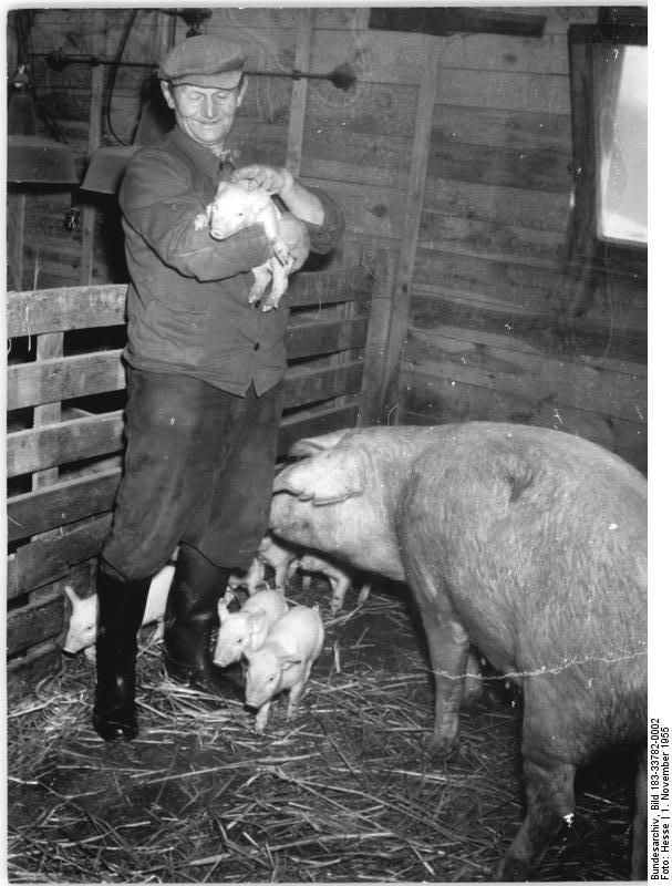 Zentralbild-Hesse Me-Ho. 2 Motive 1.11.1955 Volksgut Berlin-Buch im Wilhelm-Pieck-Aufgebot. Das Volksgut Berlin-Buch hat im Wilhelm-Pieck-Aufgebot schon gute Leistungen erzielt. Der Belegschaft war es durch unermüdliche Arbeit gelungen, dem Magistrat von Groß-Berlin einen überplanmäßigen Gewinn von 103000 DM zur Verfügung zu stellen. Das Ergebnis der gemeinsamen Bemühungen der Belegschaft ist um so bemerkenswerter, da das Volksgut Berlin-Buch nicht zu den Gütern gehörte, die mit einem Gewinn eigeplant waren. UBz, 16000 DM (eins sechs null null null) bringt dem Volksgut die Verpflichtung der Kollegen von der Viehzuchtbrigade, 330 (drei drei null) Ferkel über den Plan hinaus aufzuziehen. -Viehzuchtbrigadier Goetsch mit dem Nachwuchs.